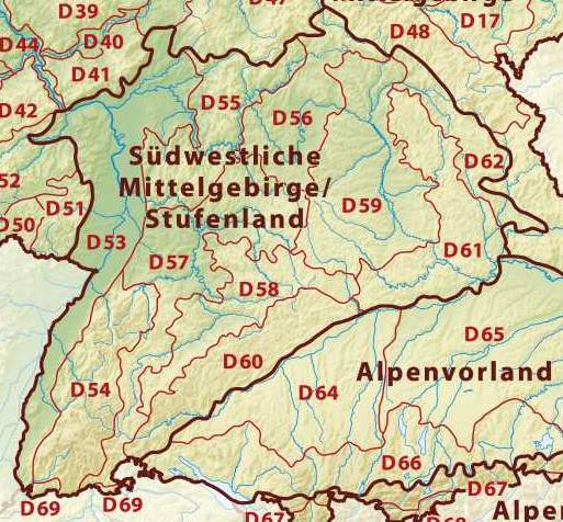 Haupteinheitengruppen der Südwestlichen Mittelgebirge